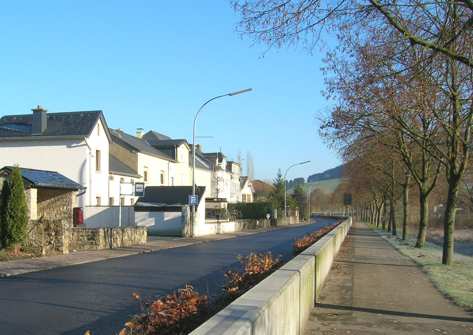 Angelduerf: Promenade laanscht d'Sauer. Kategorie:Gemeng Ierpeldeng